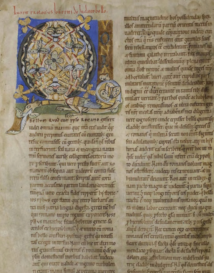 Flavius Josephus: De bello Judaico